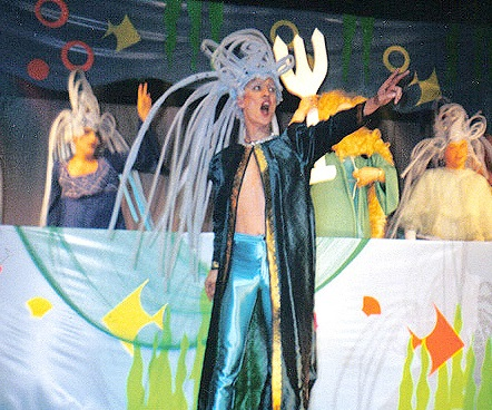 Ovo Maltine auf der Bühne BKA-Luftschloß